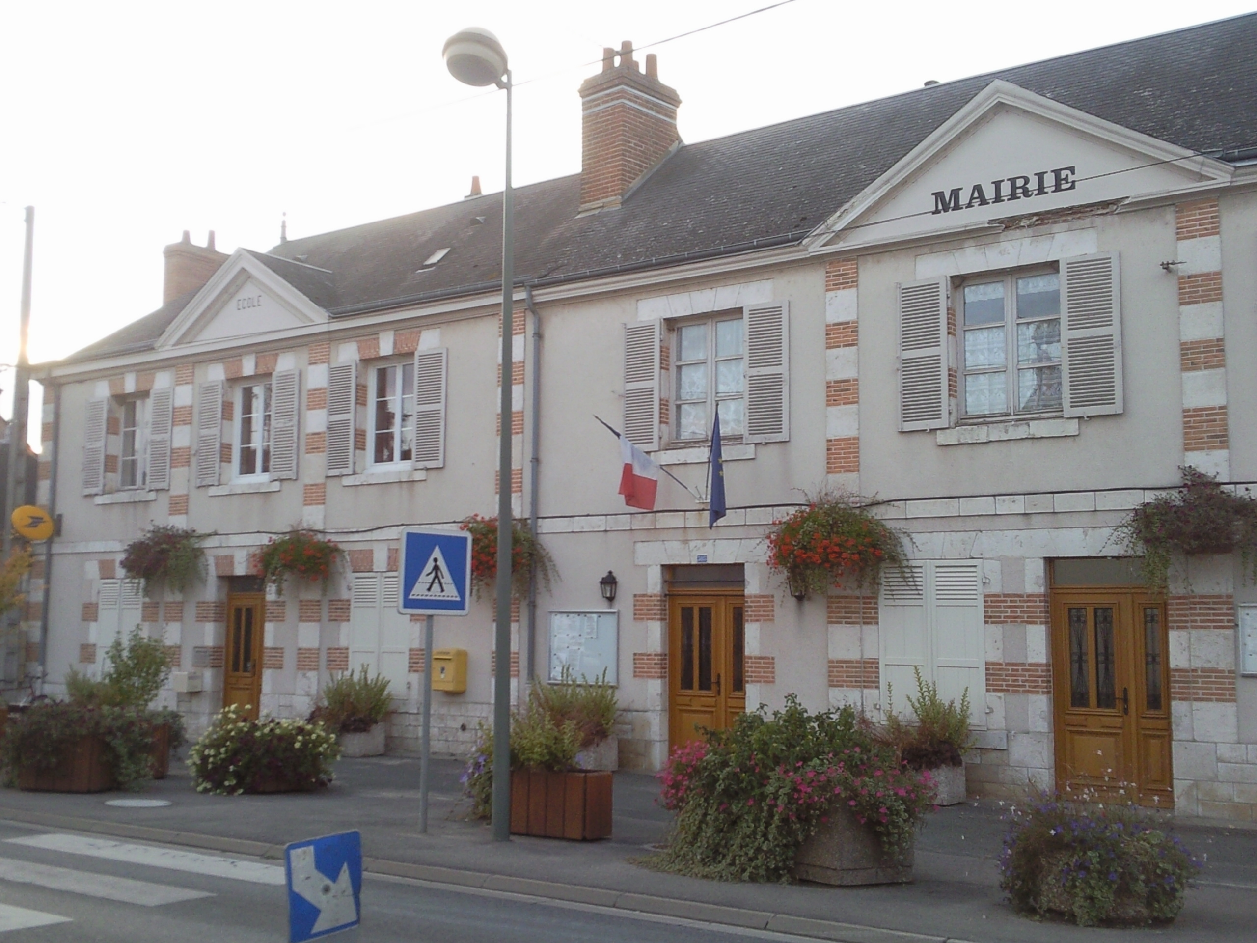 Mairie de Mareau-aux-prés (Loiret)